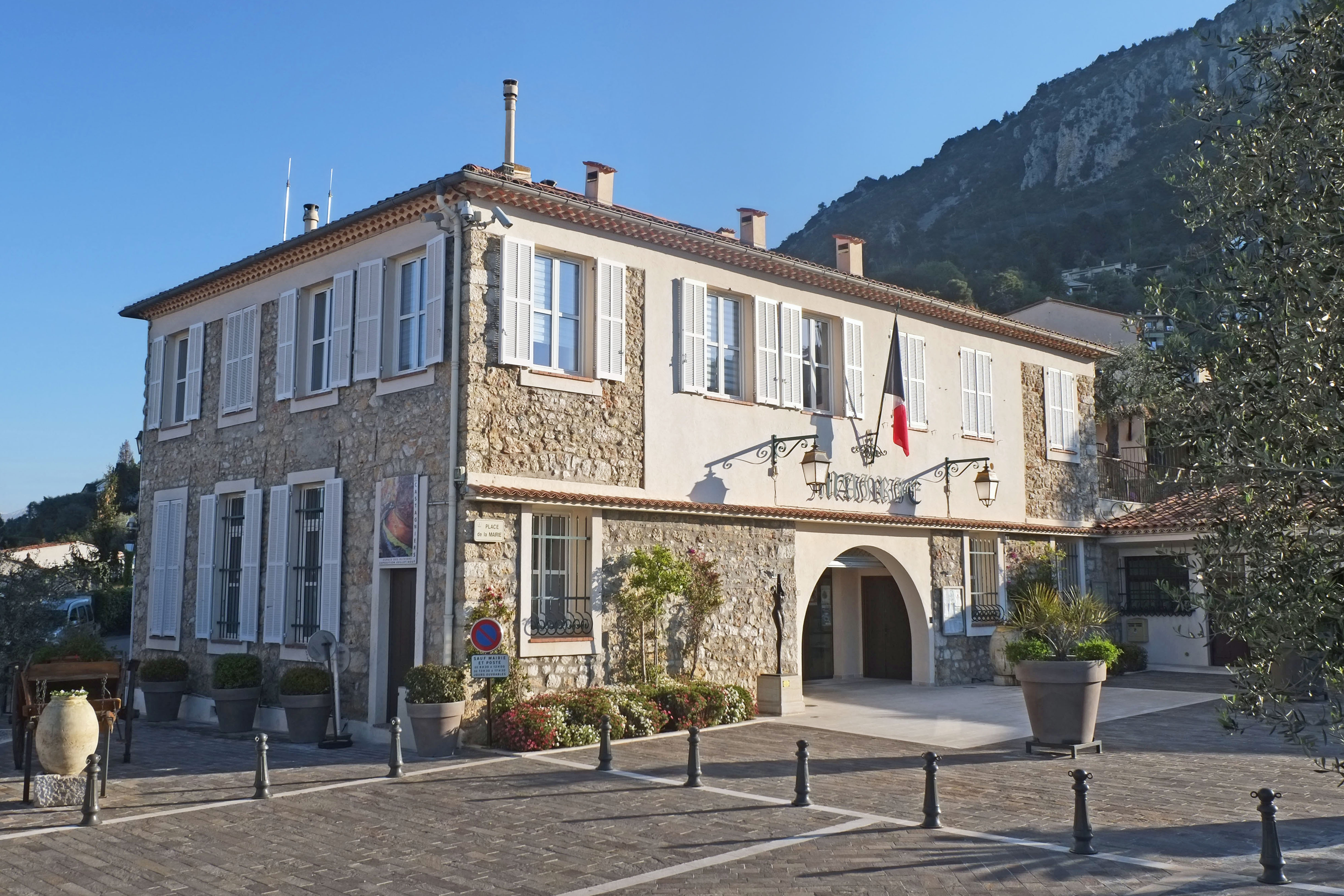 La mairie de Castagniers.